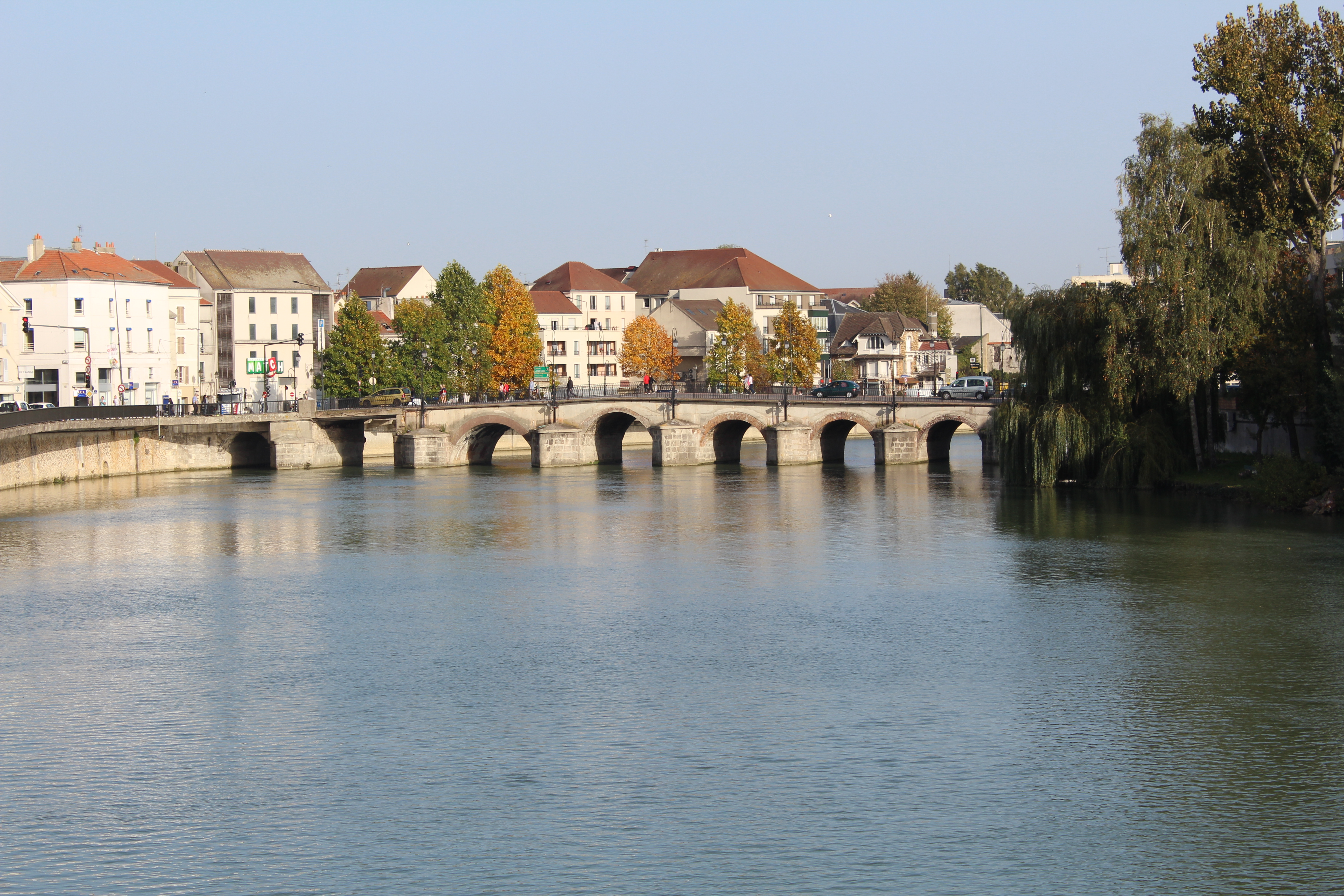 Pont du Marché de Meaux.